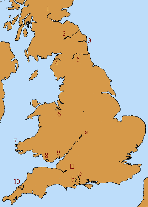 Alaunos (stêrioù)